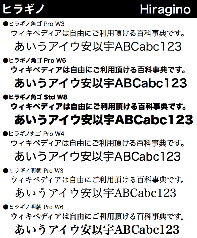 Hiragino(ヒラギノ) Sample